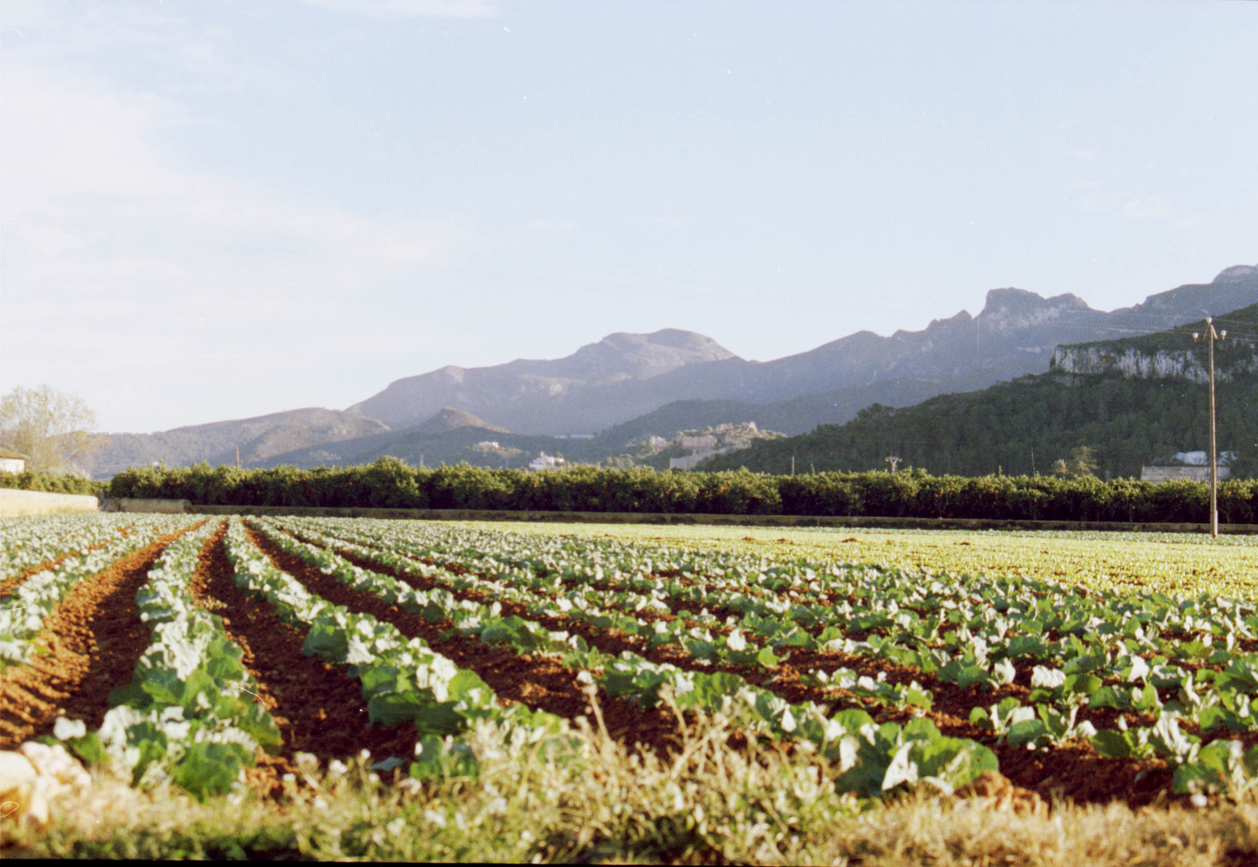 Huerto Corbera Benicull.